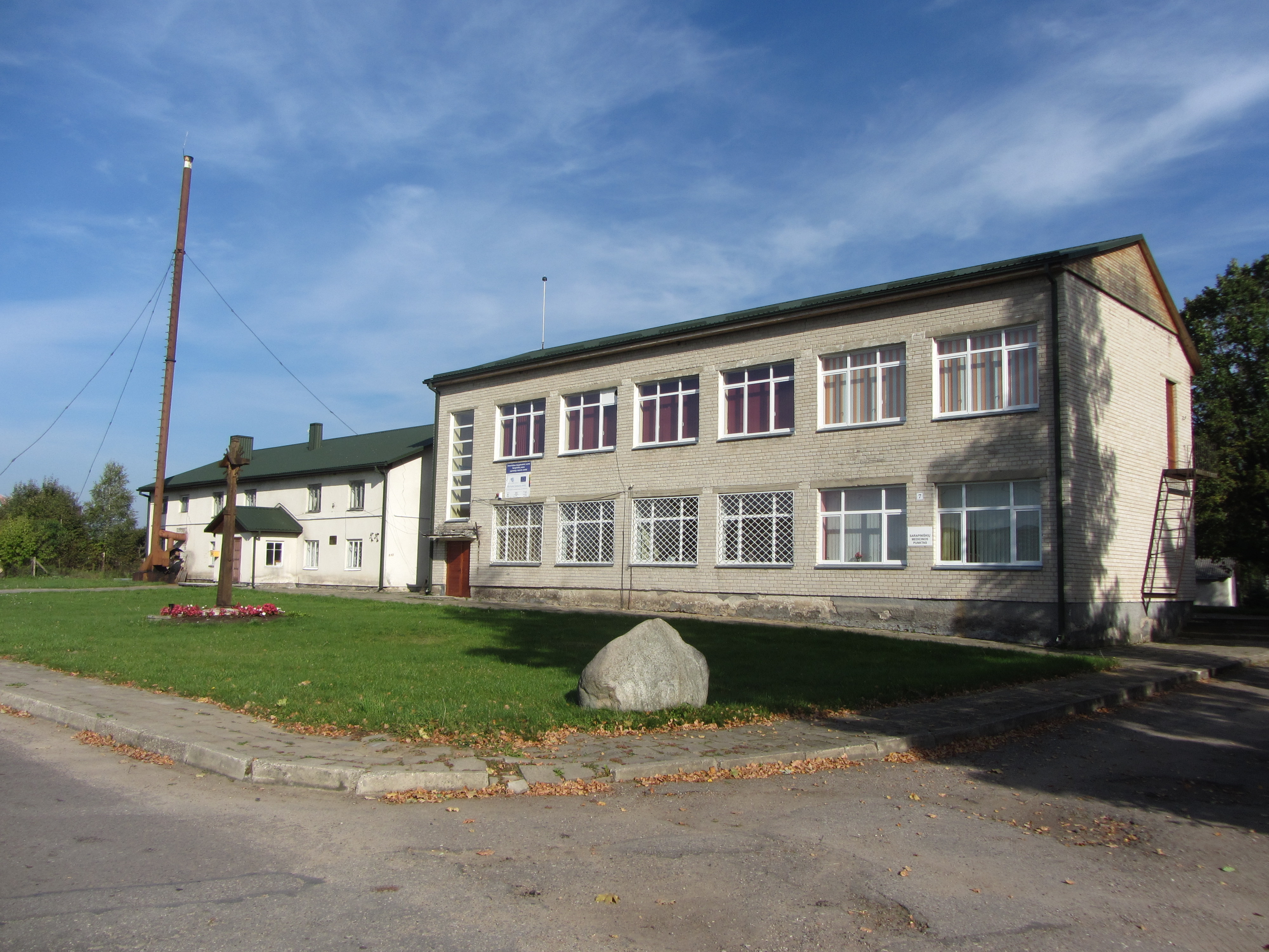 Sarapiniškės, Lithuania